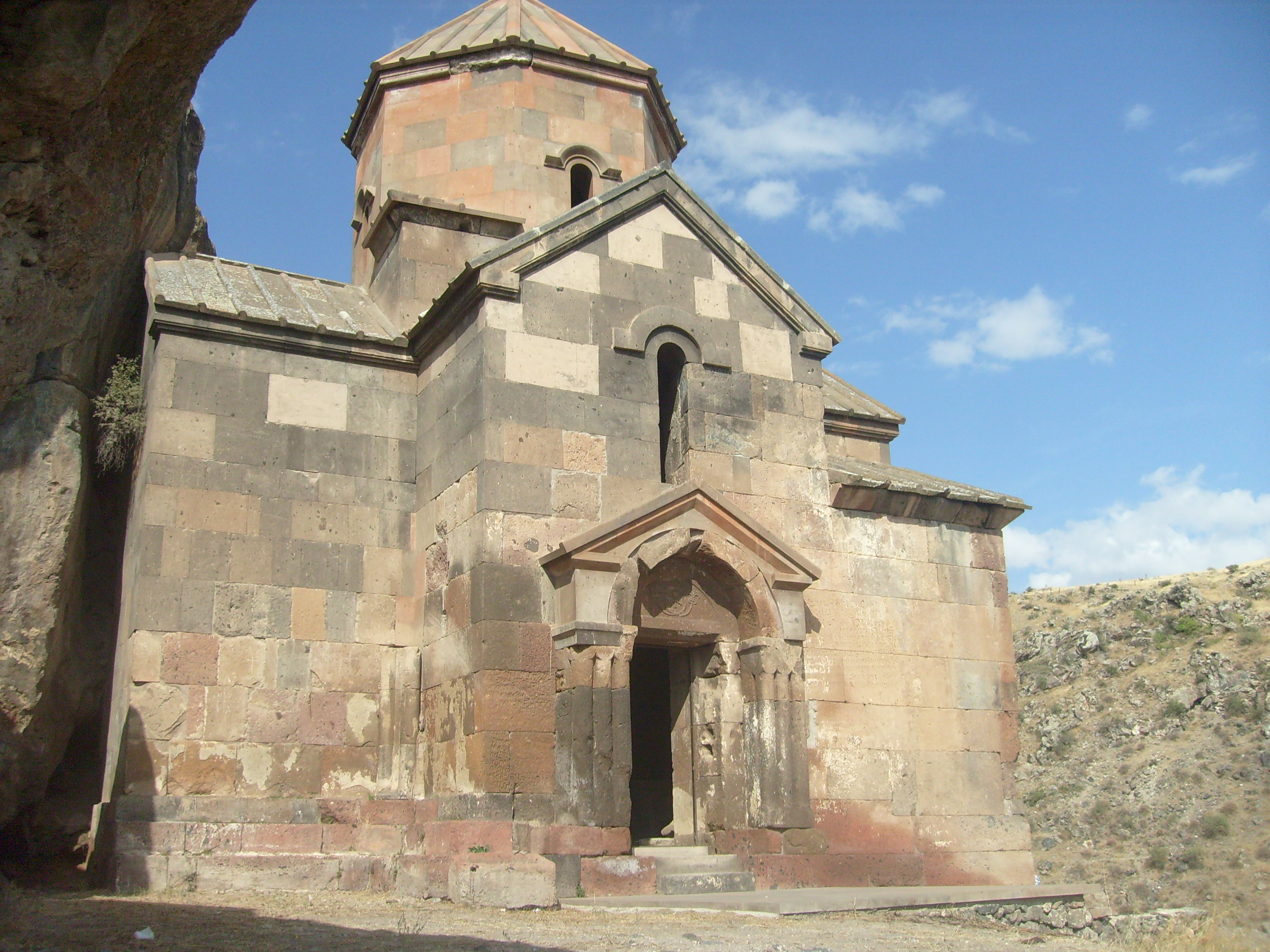 Եկեղեցի Ս. Ստեփանոս, Կոշից հյուսիս, 7-17 դդ. 61/11